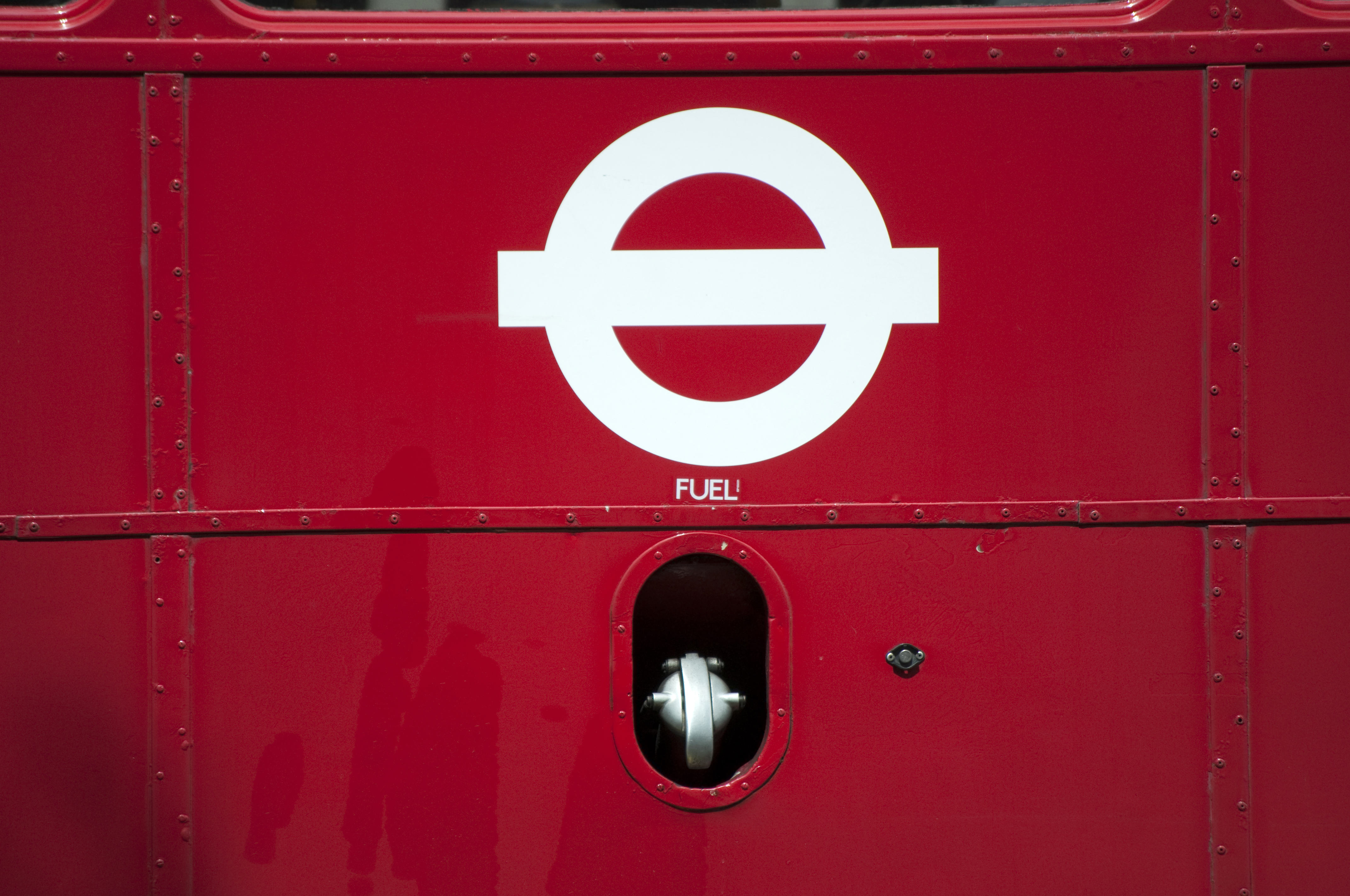 Trafalgar Square, bus, roundel, fuel